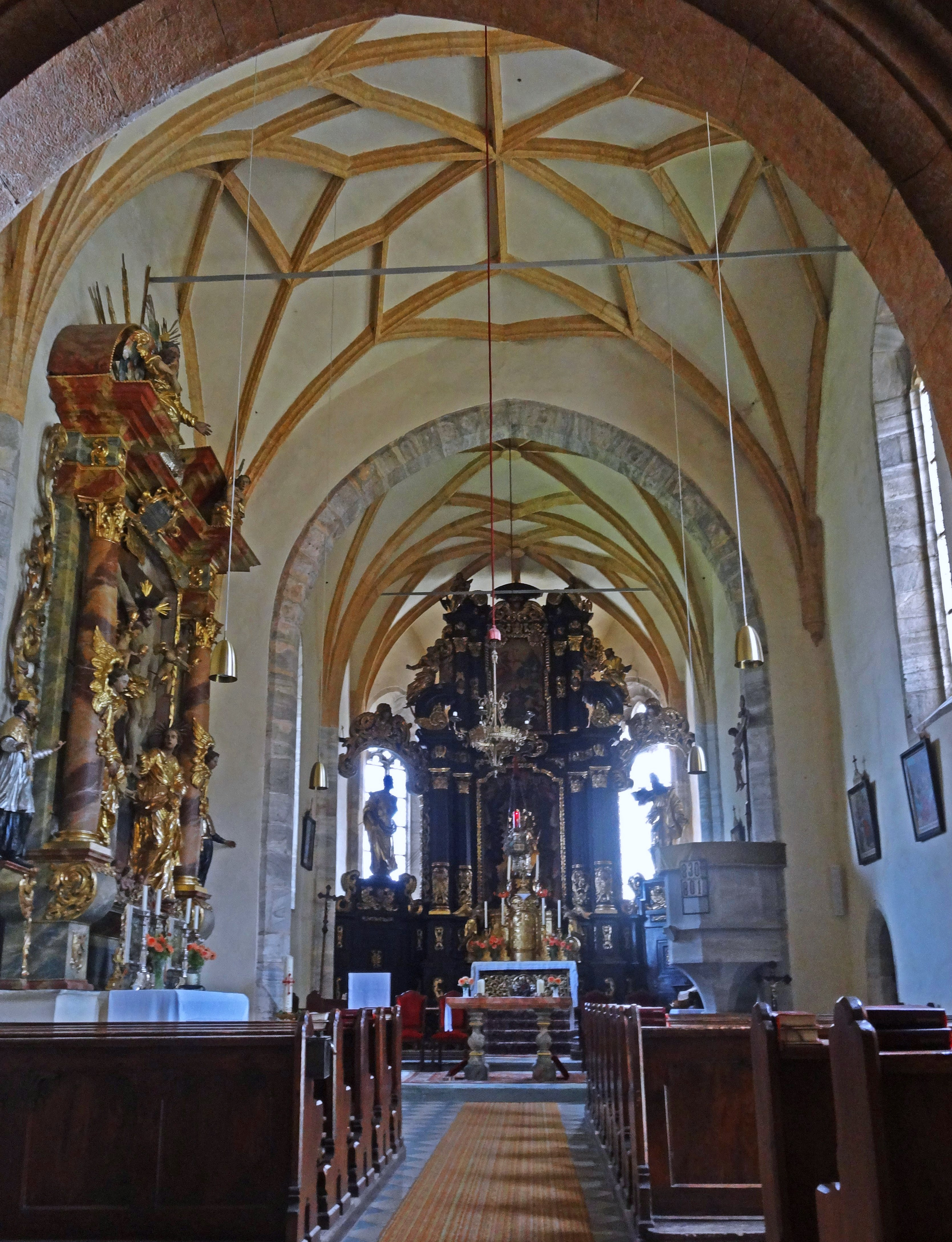 Kath. Filialkirche hl. Maria, Maria Feicht. Innenansicht